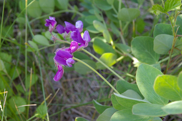 ハマエンドウ（北海道以久科原生花園） Lathyrus japonicus (Ikushina-Genseikaen, Hokkaido, JAPAN)